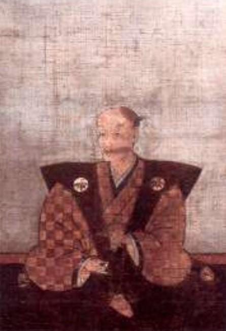 松平清善の肖像。